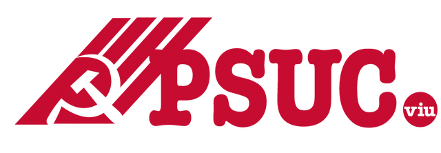 Partit Socialista Unificat de Catalunya viu